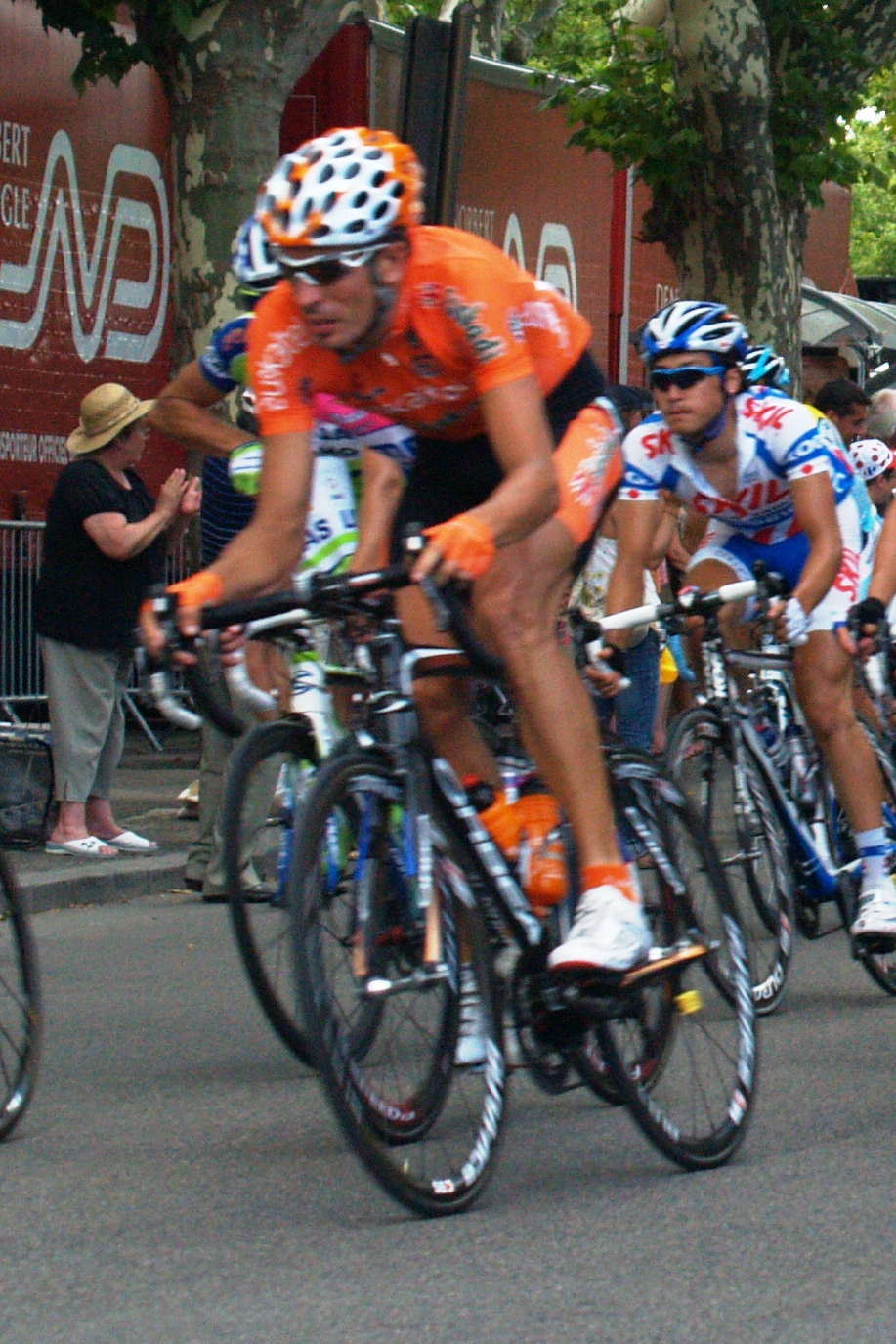 Peloton du Tour de France 2009 en Arles.